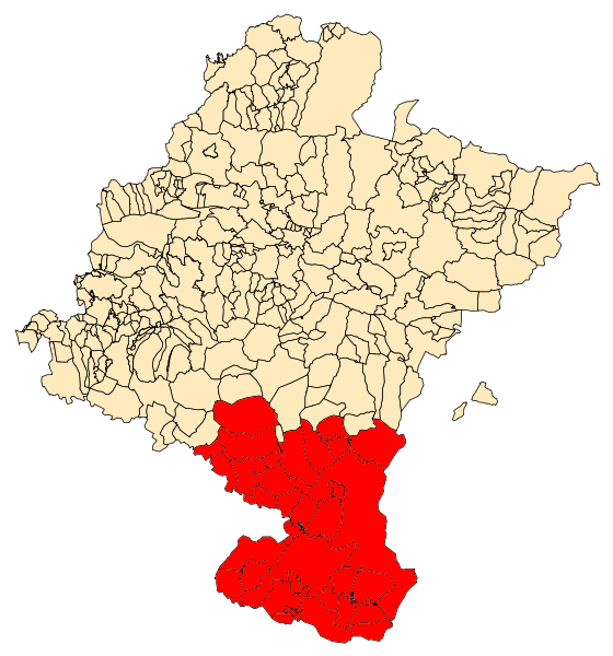 Erriberaren kokapena Nafarroan